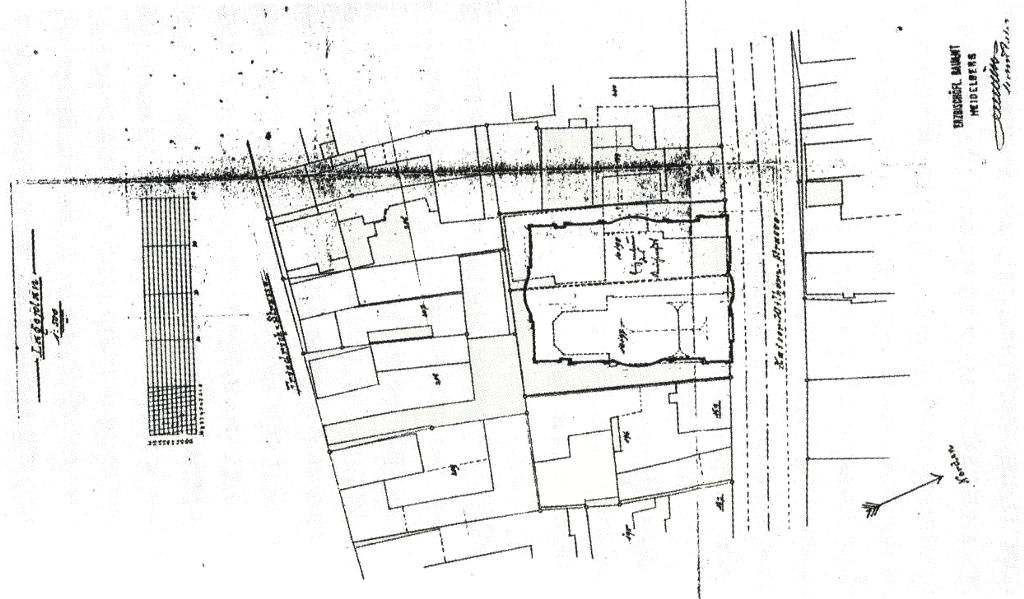 St.-Jakobus-Kirche in Mannheim